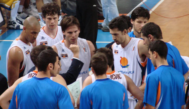 Menorca Estudiantes 2007-Pavelló Menorca